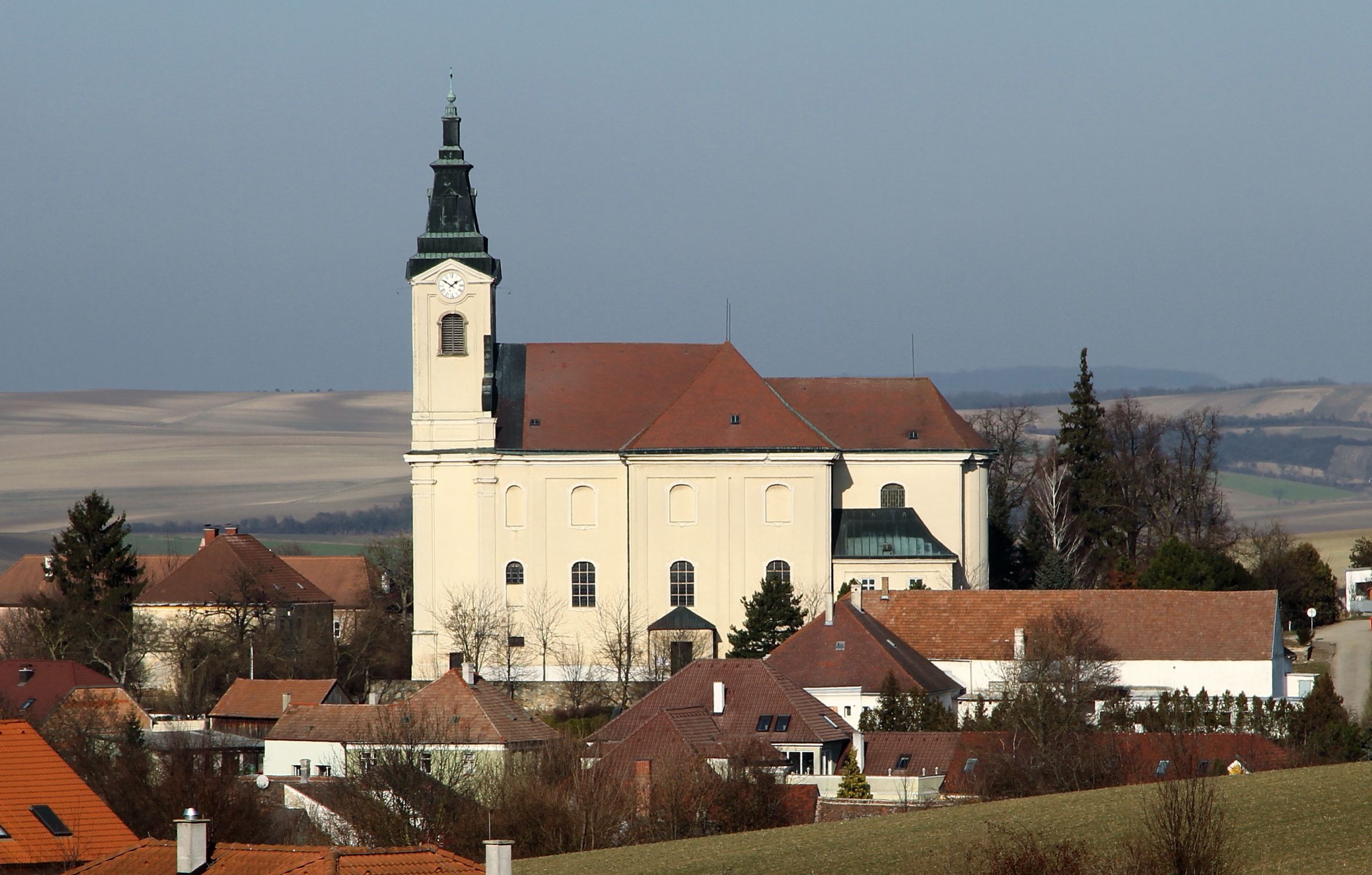 Katholische Pfarrkirche hl. Laurentius in der niederösterreichischen Gemeinde Niederhollabrunn.